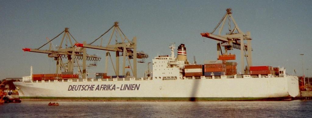 Transvaal 1994 in Hamburg